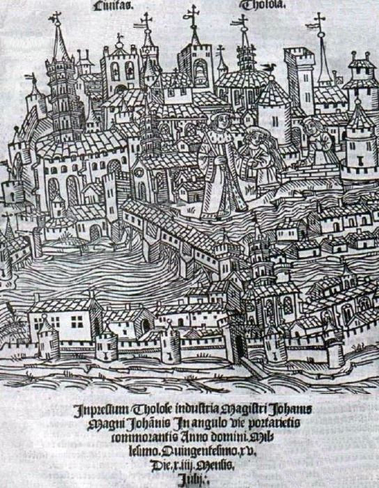 Le Pont couvert de la Daurade à Toulouse, construit de 1141 à 1179, au début du XVIe siècle ('Gesta Tolosanorum', Nicolas Bertrand, Archives municipales).